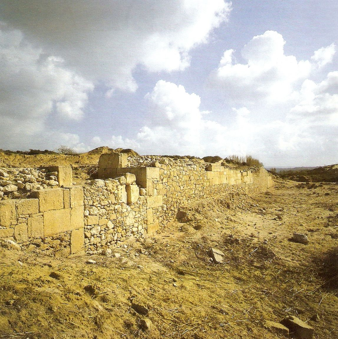 Mura di Kamarina, (età arcaica)